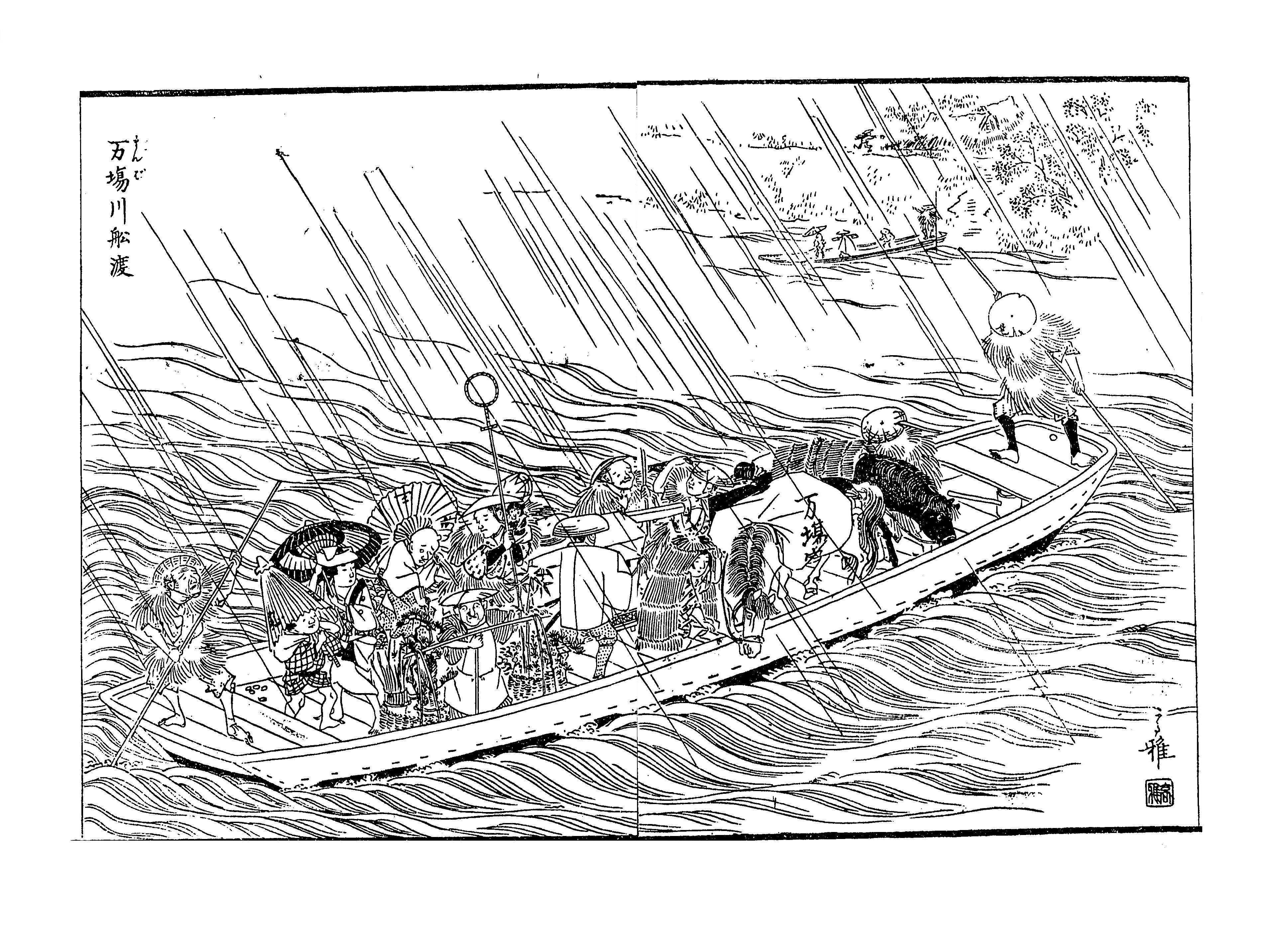 尾張名所図会. 巻７ 海東・海西郡 万場川舟渡 （国立国会図書館デジタルコレクションより入手）